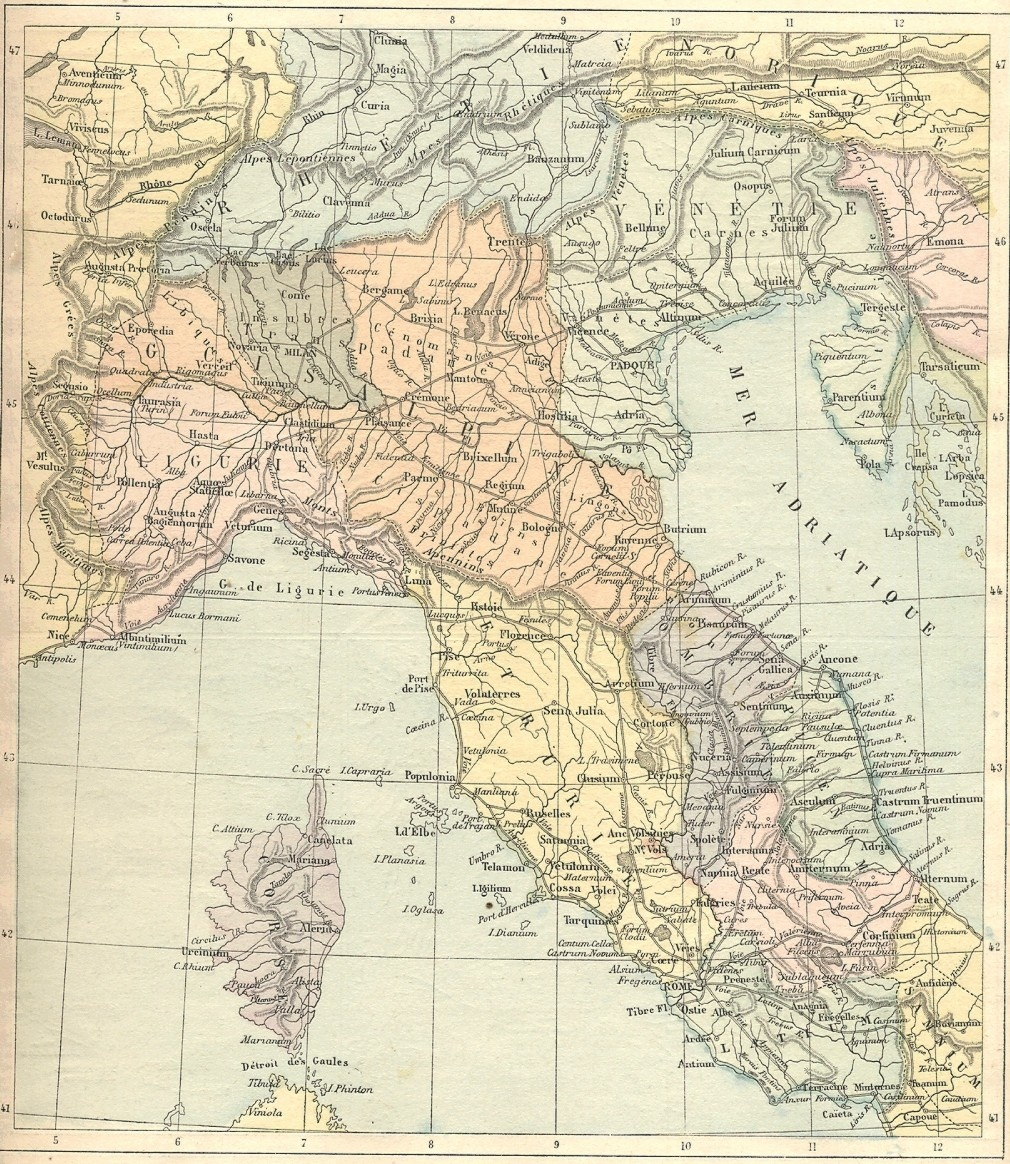 Atlas de Géographie Ancienne de L. Carrez de 1886